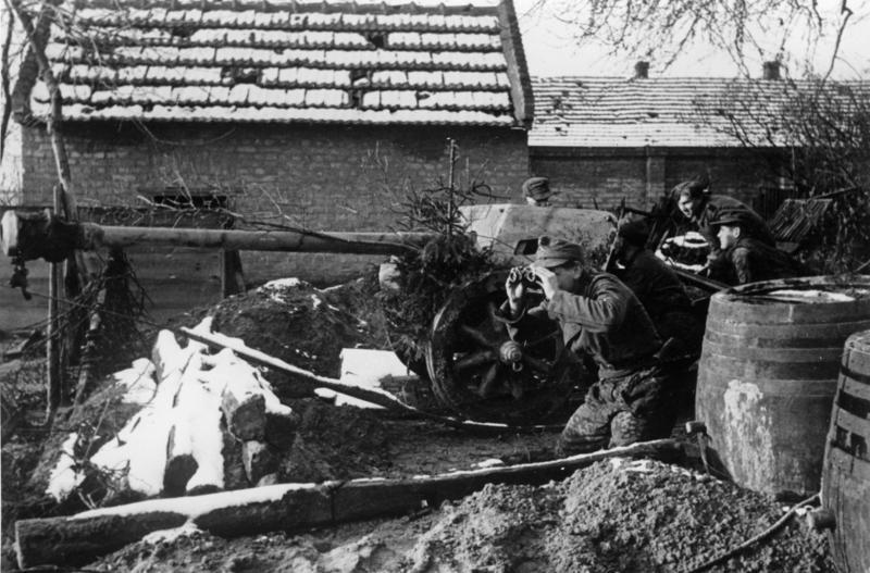 Budapest, Getarnt zwischen Gerümpel eines Gehöfts steht deutsche Pak zur Abwehr sowjetischer Angriffe am Rande der ungarischen Hauptstadt bereit. 10-1-45-[Herausgabedatum] PK-Aufnahme-Kriegsber. Faupel